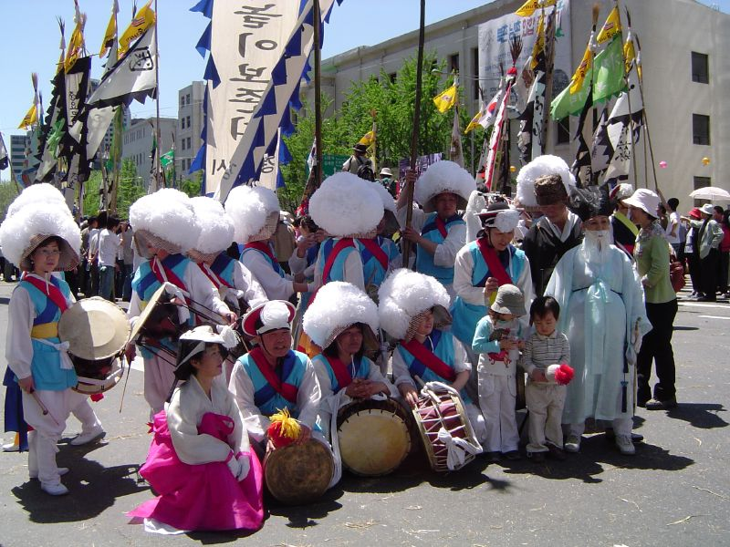 2006년 5월, 안녕 서울 축제 퍼레이드